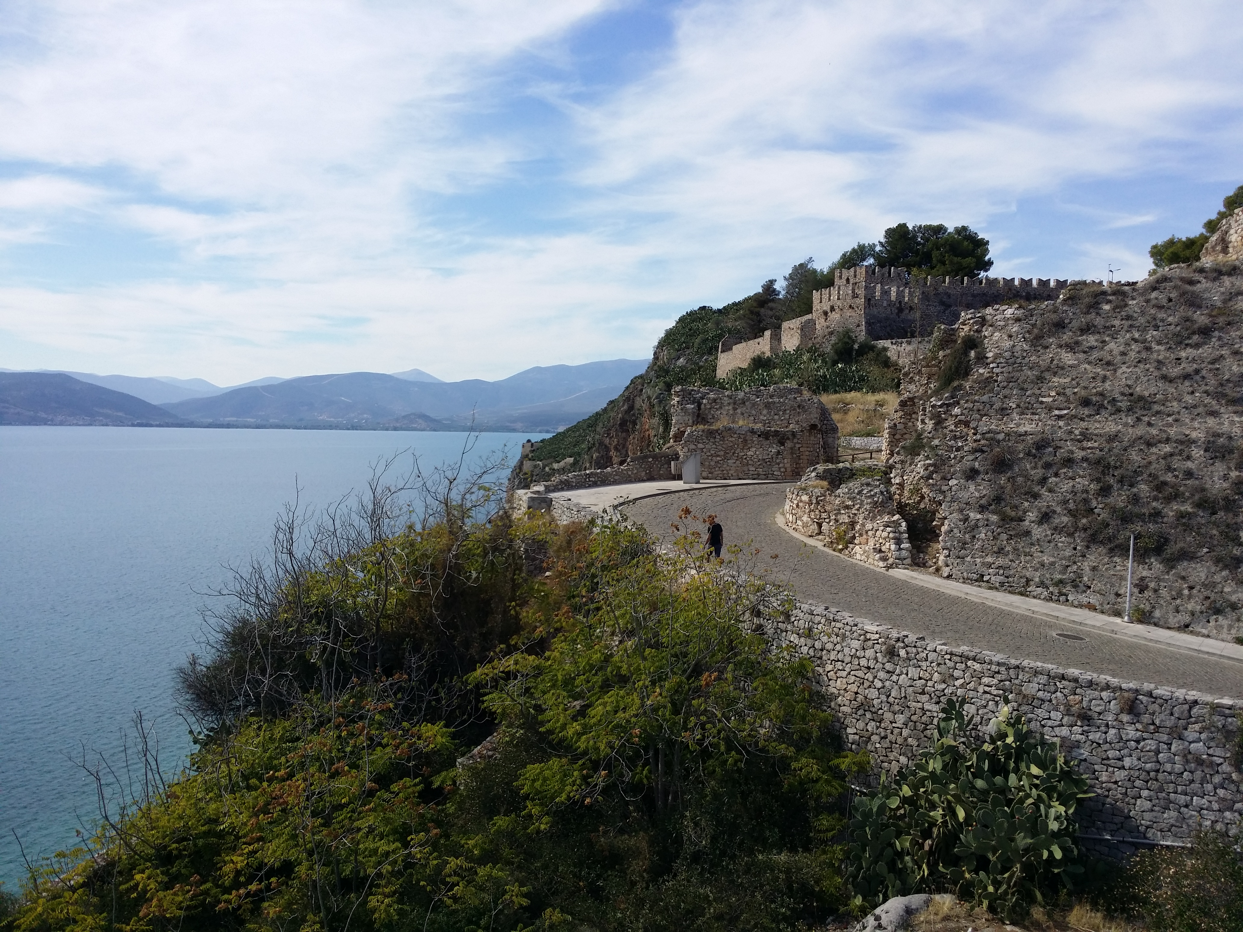 Άποψη της Ακροναυπλίας από το εγκαταλελειμμένο ξενοδοχείο Ξενία.